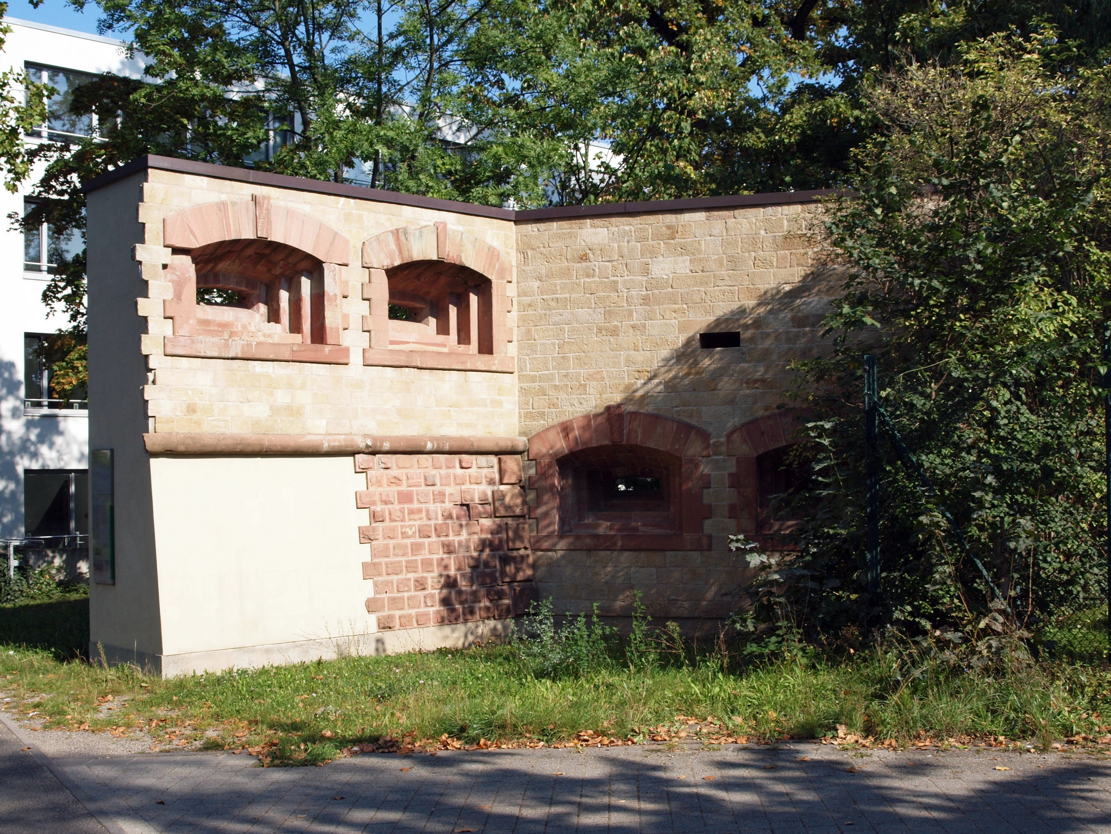 Gonsenheimer Tor; Rekonstruktion eines Tores der letzten Stadtmauer von Mainz.